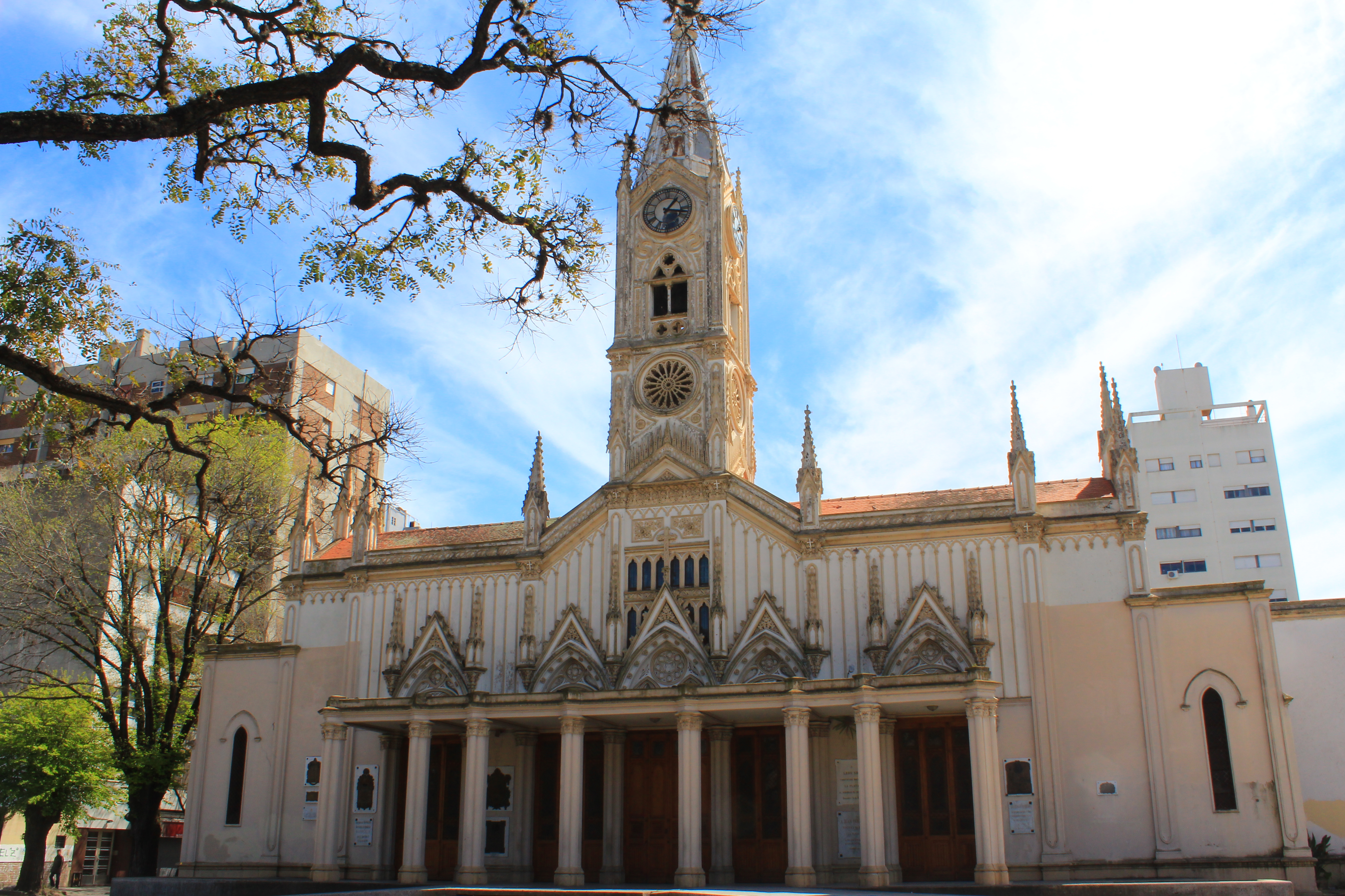 Basílica de San Ponciano y la Plazoleta San Ponciano